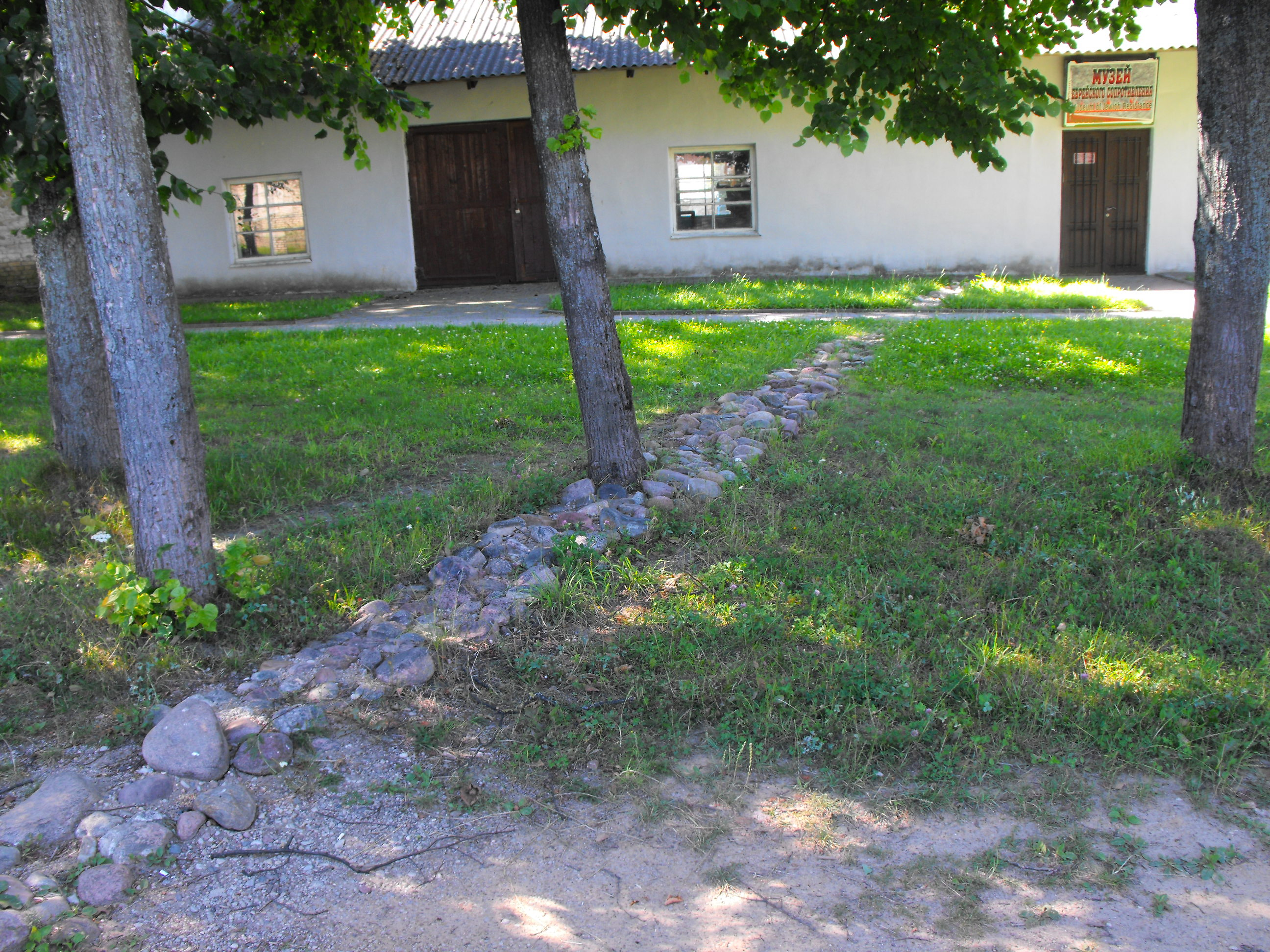 Музей еврейского сопротивления в Новогрудке в здании барака бывшего гетто. Обозначенная снаружи часть подземного хода (250 метров), прорытого узниками гетто в 1943 году.